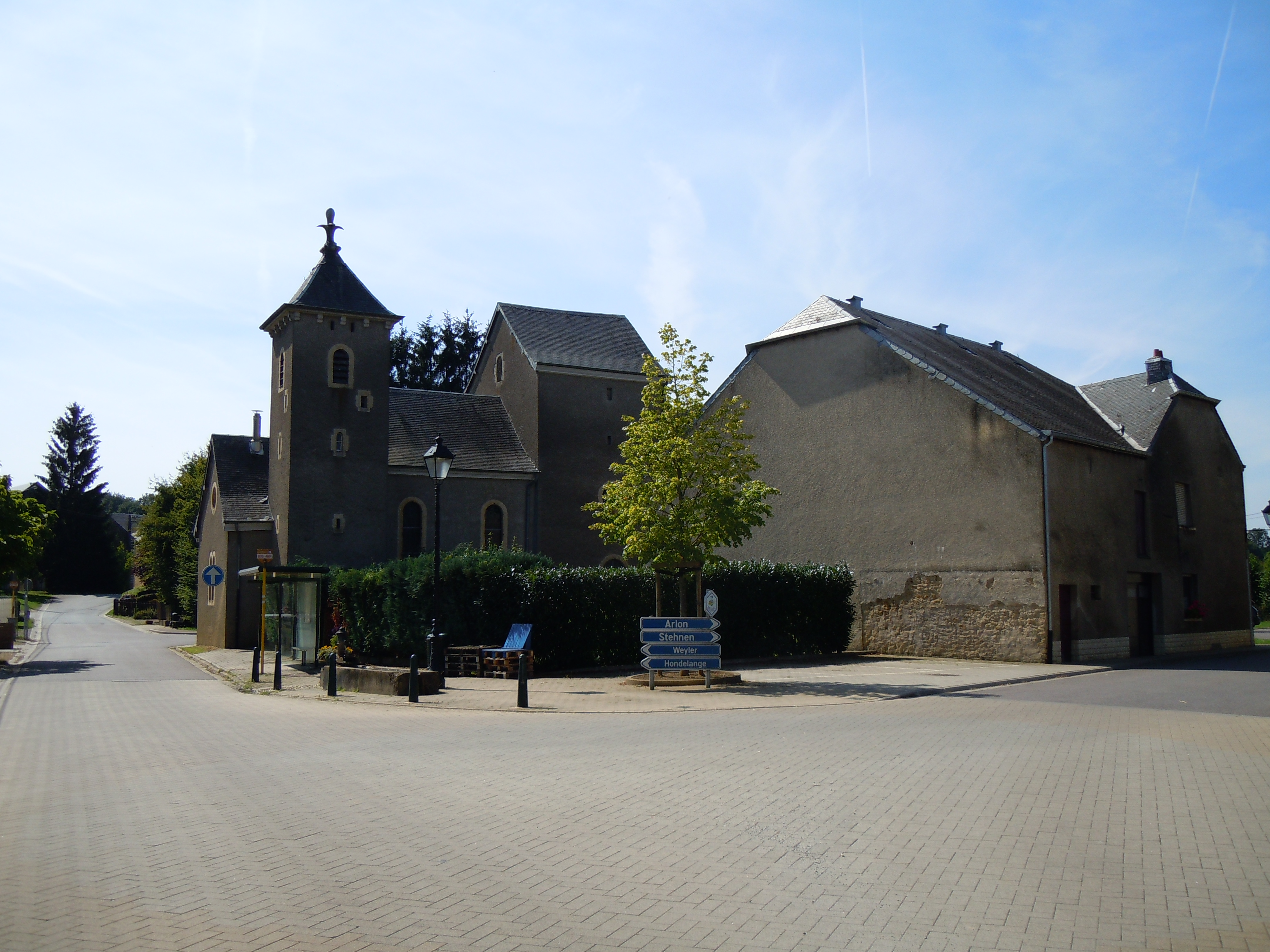 Le centre du village belge d'Autelhaut et sa chapelle fortifiée Saint-Nicolas